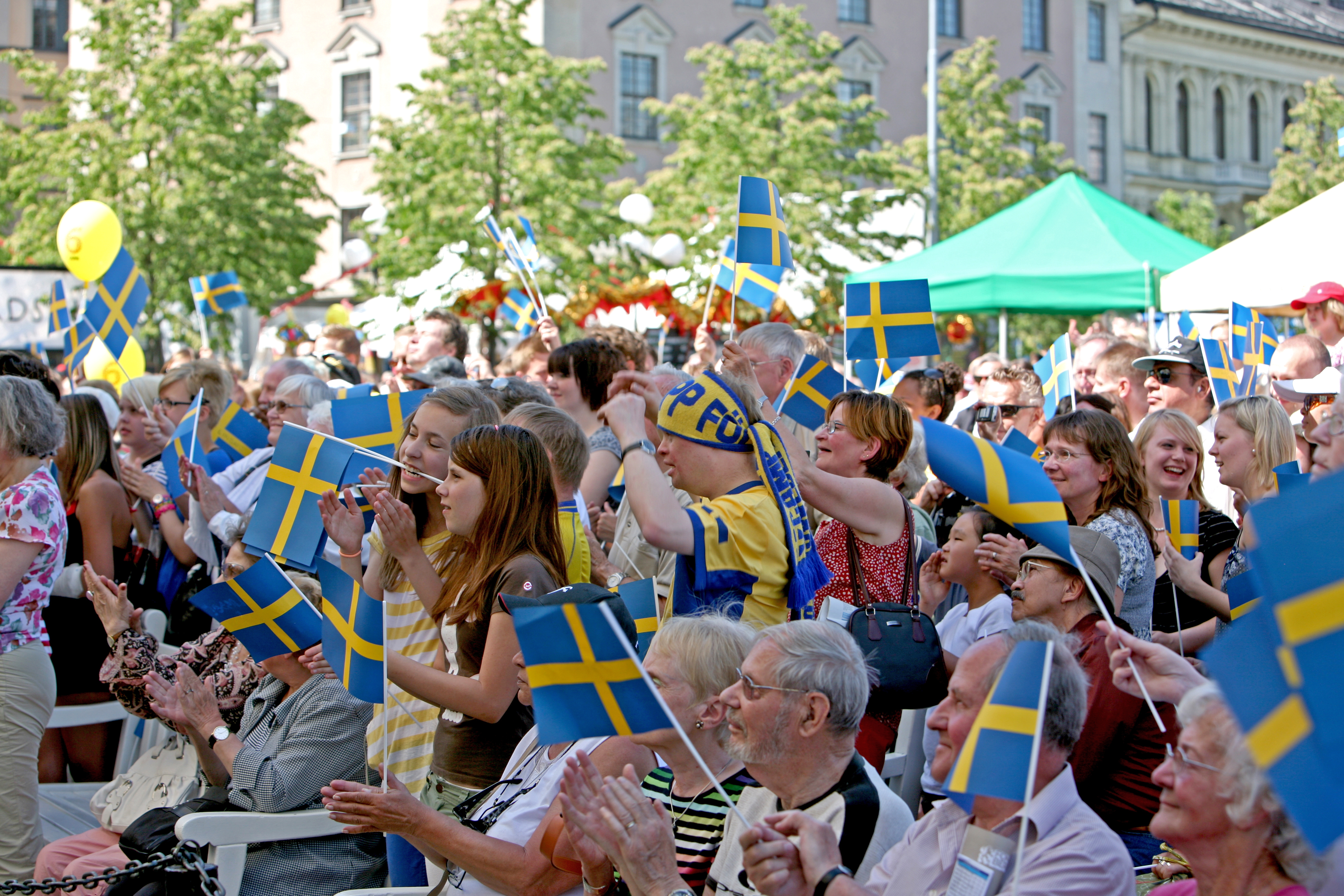 Svenska Nationaldagen i Kungsträdgården, Stockholm, Sweden